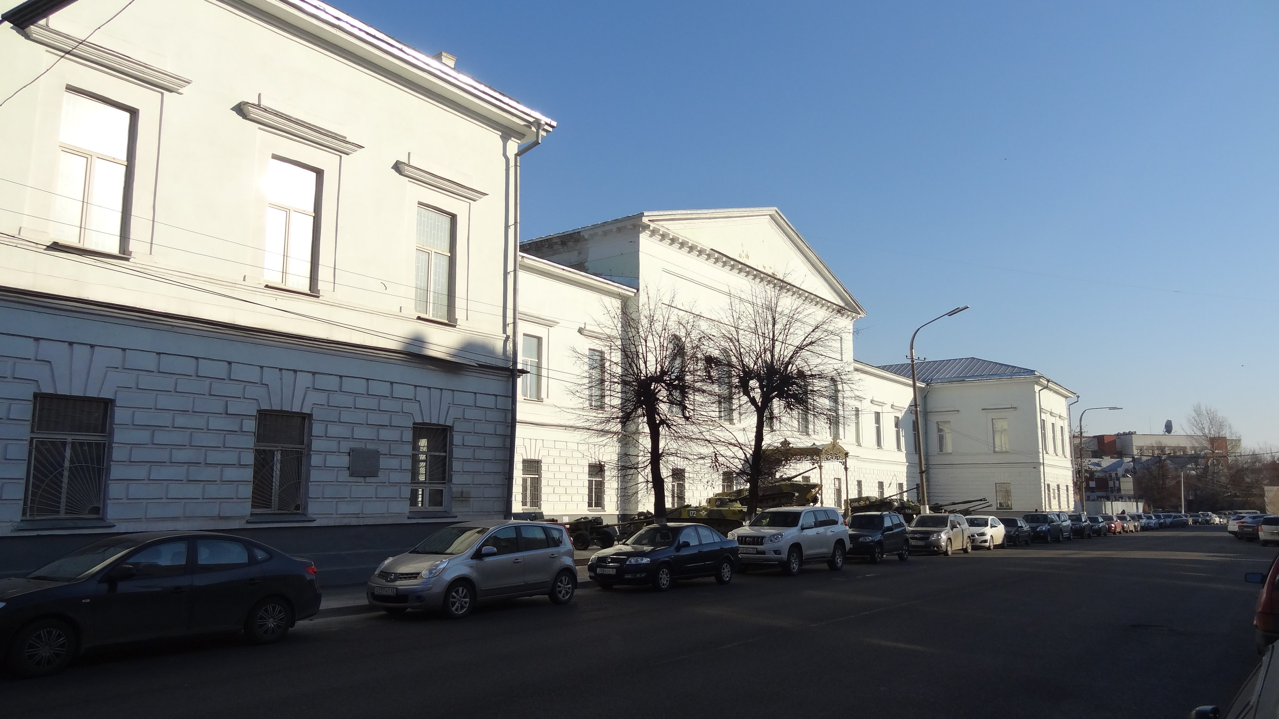 Семинария духовная (Рязанская область, Рязань, улица Семинарская (Каляева), 20)